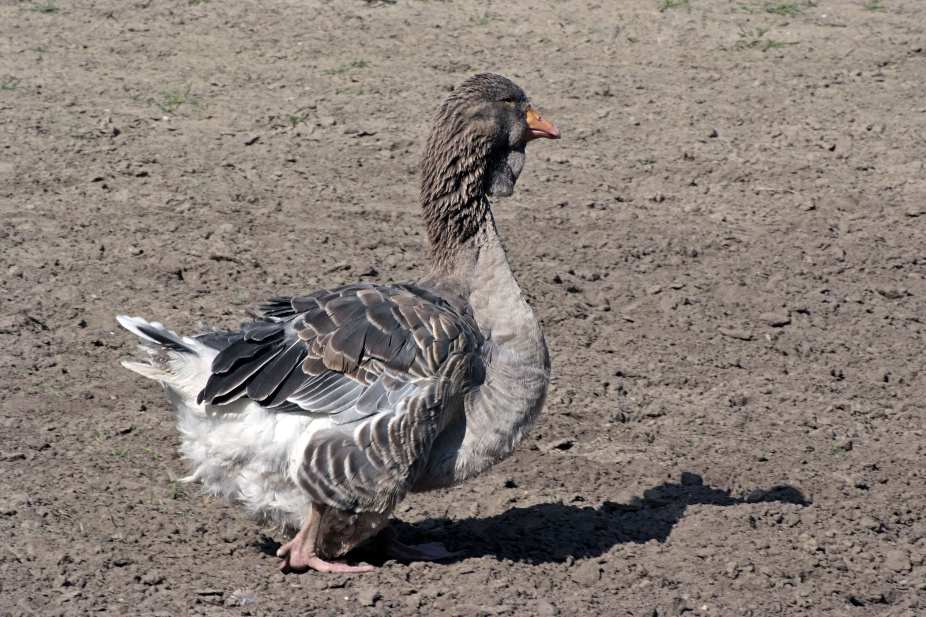 Toulousergans im Zoo Eberswalde